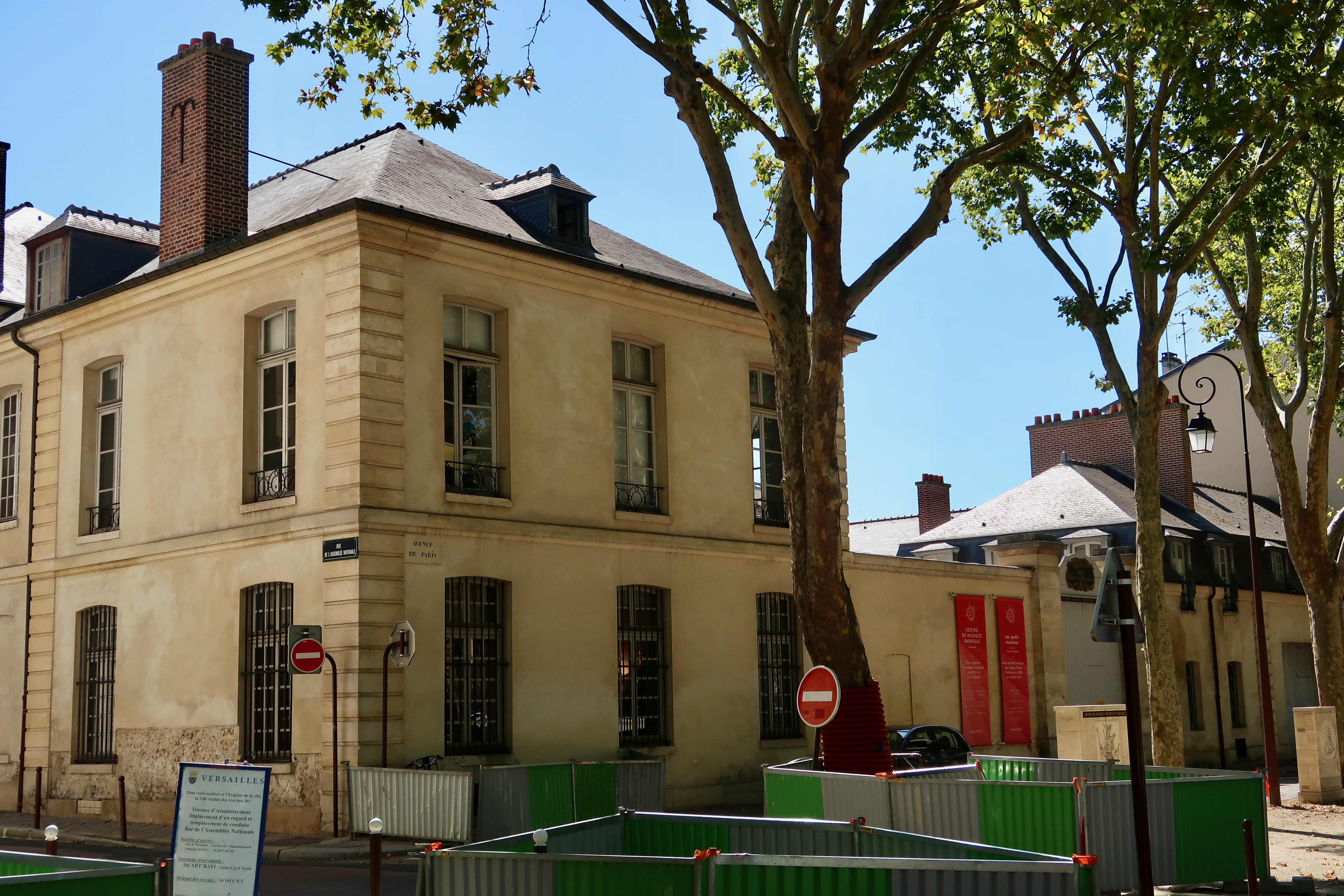 Hôtel des Menus Plaisirs, 22 avenue de Paris (Versailles).